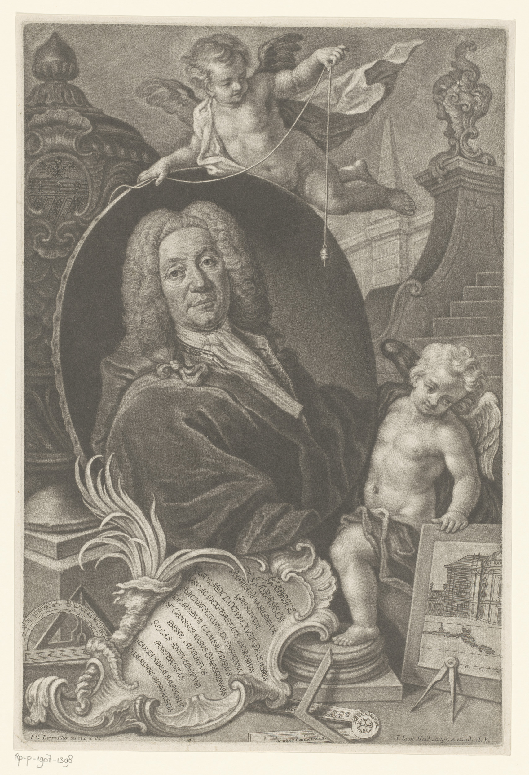 IdentificatieTitel(s): Portret van Gabriel de GabrieliObjecttype: prent Objectnummer: RP-P-1907-1398Opschriften / Merken: verzamelaarsmerk, verso, gestempeld: Lugt 2228VervaardigingVervaardiger: prentmaker: Johann Jacob Haid (vermeld op object)naar tekening van: Johann Georg Bergmüller (vermeld op object)naar ontwerp van: Johann Georg Bergmüller (vermeld op object)uitgever: Johann Jacob Haid (vermeld op object)Plaats vervaardiging: AugsburgDatering: 1714 - 1747Materiaal: papier Techniek: mezzotint / etsenAfmetingen: plaatrand: h 405 mm × b 270 mmOnderwerpWat: historical personstools, implements of architectportrait, self-portrait of architectcupids: 'amores', 'amoretti', 'putti'rocaille ornamentWie: Gabriel de GabrieliVerwerving en rechtenVerwerving: aankoop 1905Copyright: Publiek domein